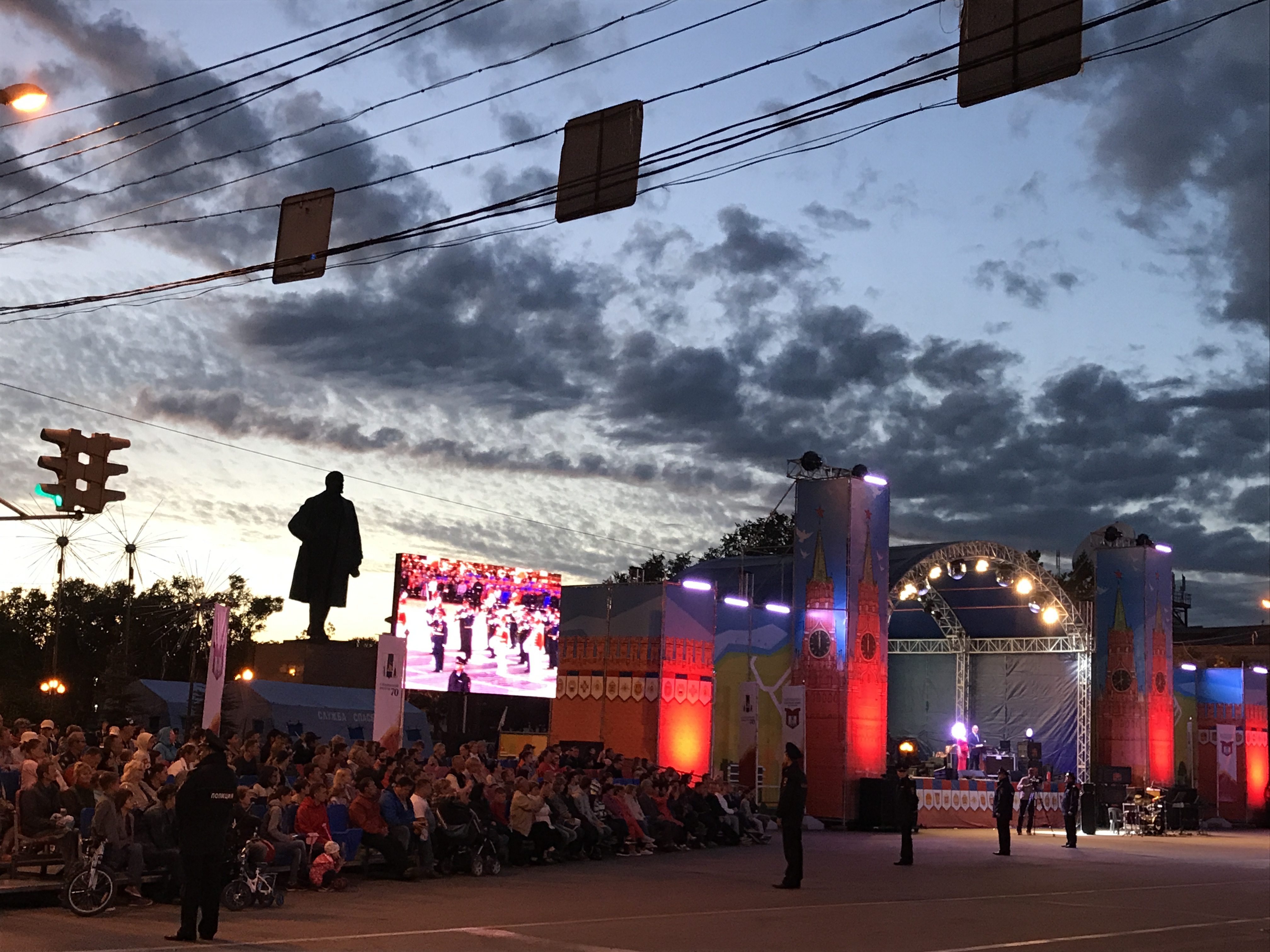 Памятник Ленину, улица Ленина, Южно-Сахалинск, Сахалинская область